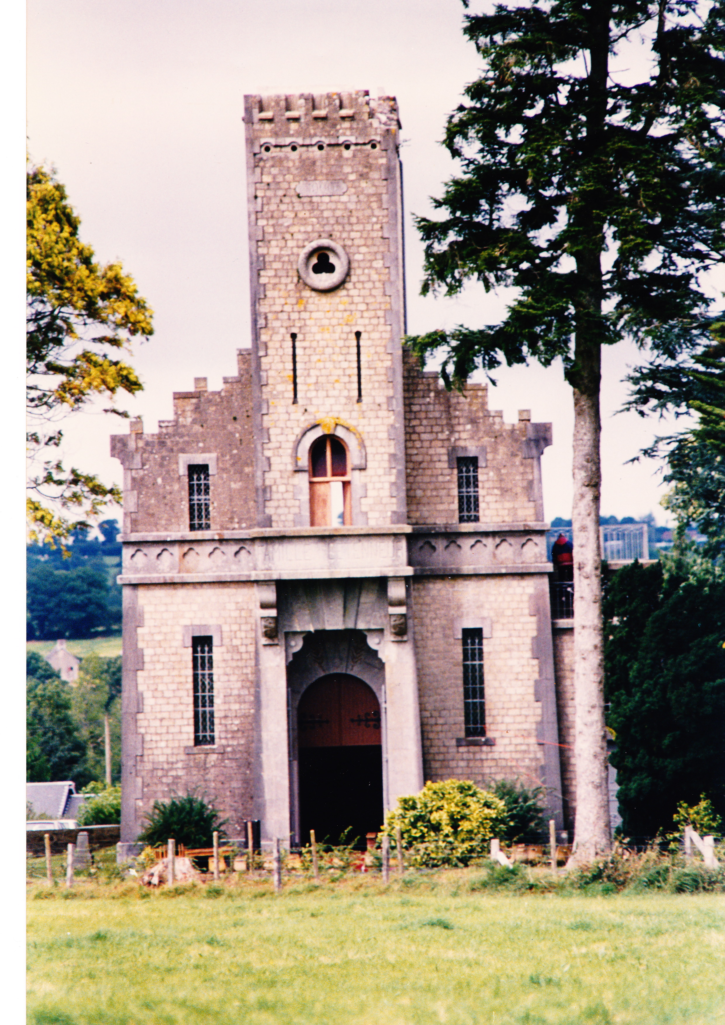 Construit en 1900 à Roncey dans la Manche